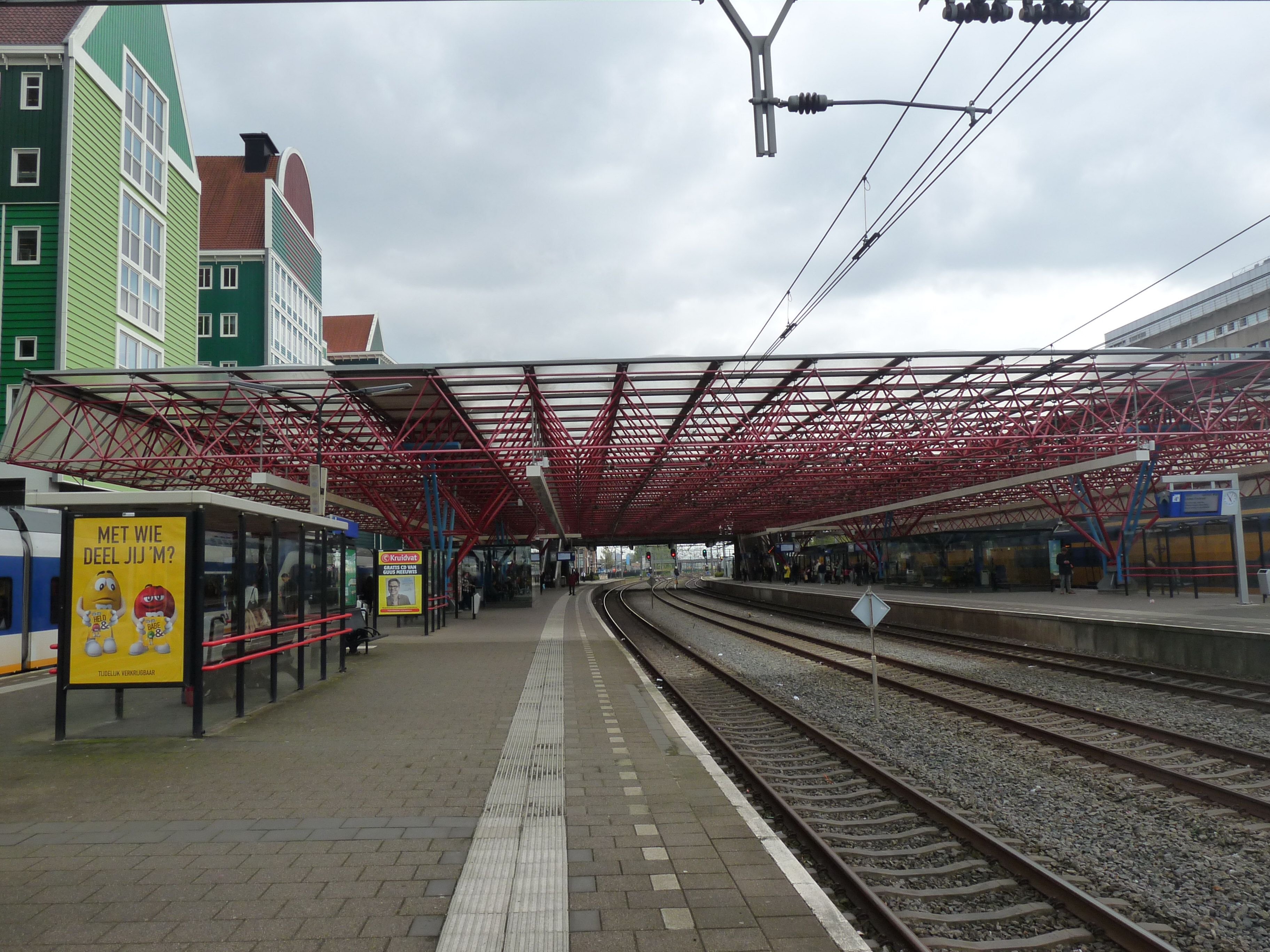 Station Zaandam